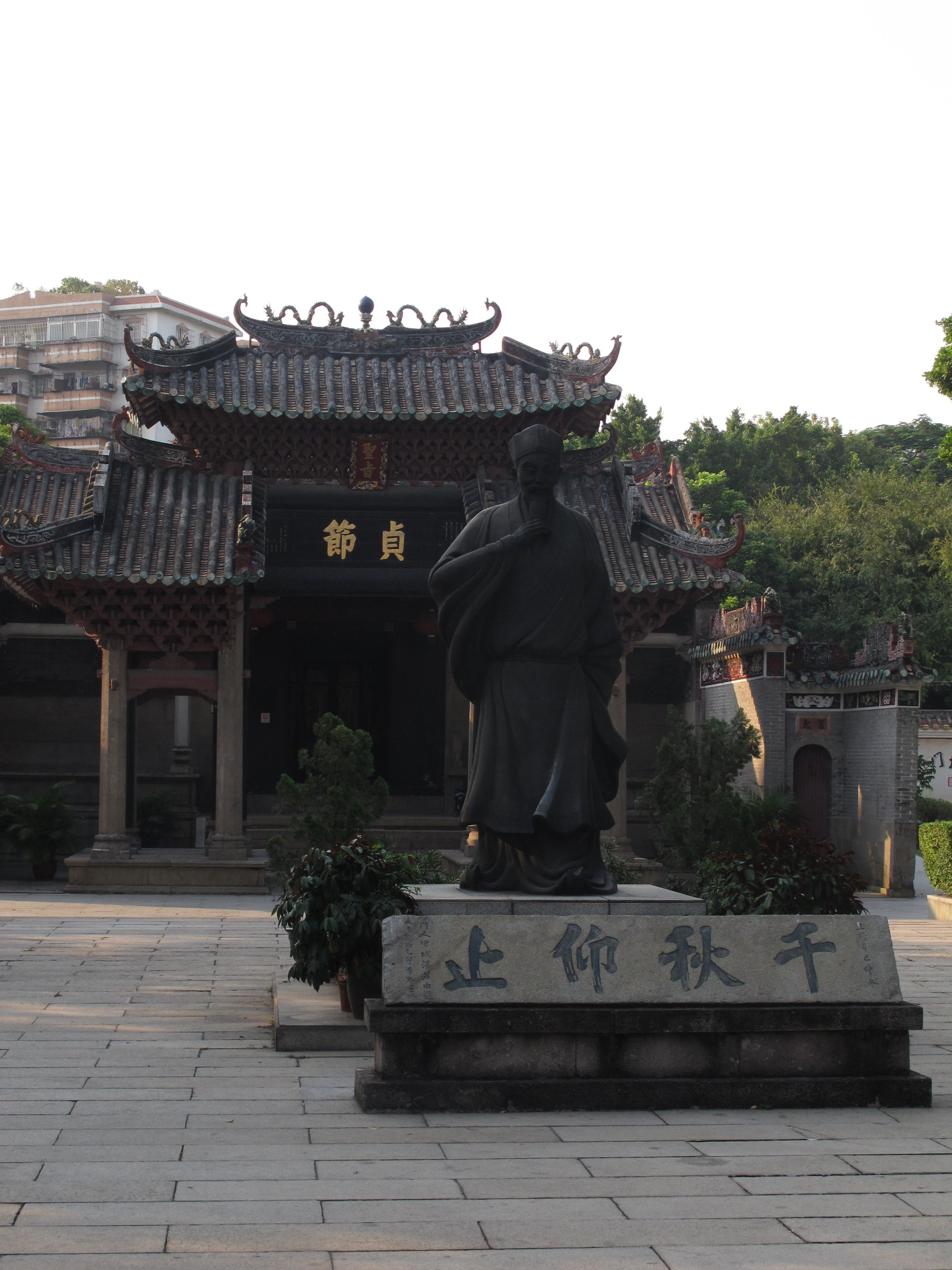 中文（中国大陆）: 白沙祠是明代白沙人陈白沙的家祠